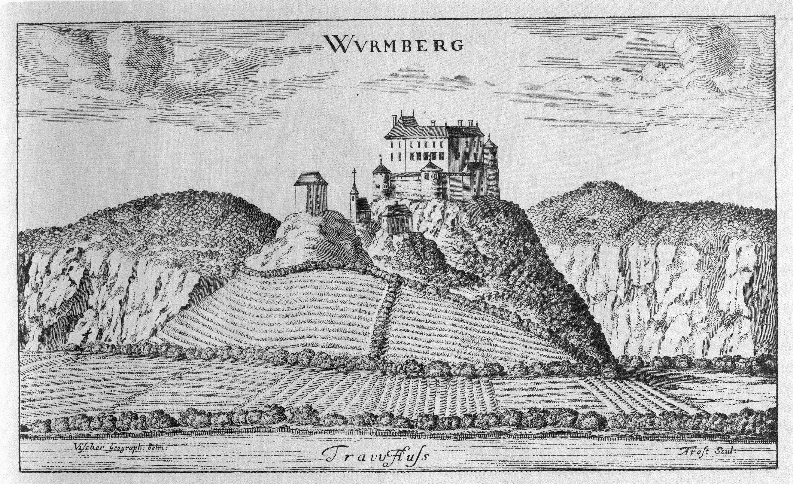 G. M. Vischers Käyserlichen Geographi, Topographia Ducatus Stiriae, Das ist: Eigentliche Delineation / und Abbildung aller Städte / Schlösser / Marcktfleck / Lustgärten / Probsteyen / Stiffter / Clöster und Kirchen / so es sich im Herzogthumb Steyrmarck befinden; Und anjetzo Umb einen billichen Preyß zu finden seynd Bey Johann Bitsch Universitäts Buchhandlern / Auff dem Juden=Platz bey der guldenen Saulen. Graz 1681 Die Nummerierung der Dateien folgt der alphabetischen Reihung der Ortsnamen und entspricht nicht dem Vischer-Register